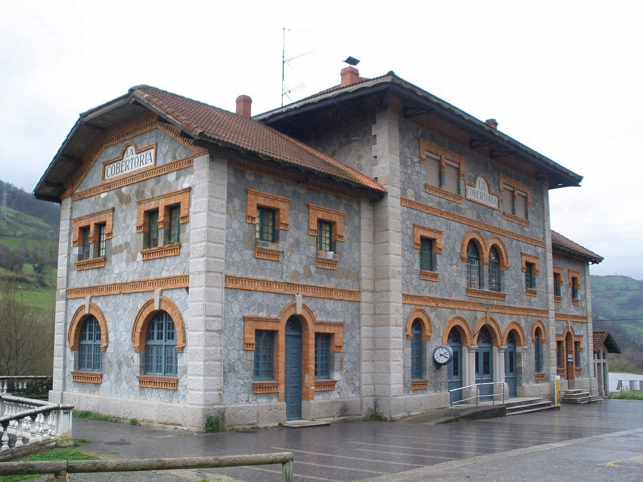 Felgueras (Lena, Asturias) - Apeadero de La Cobertoria, de Cercanías de RENFE